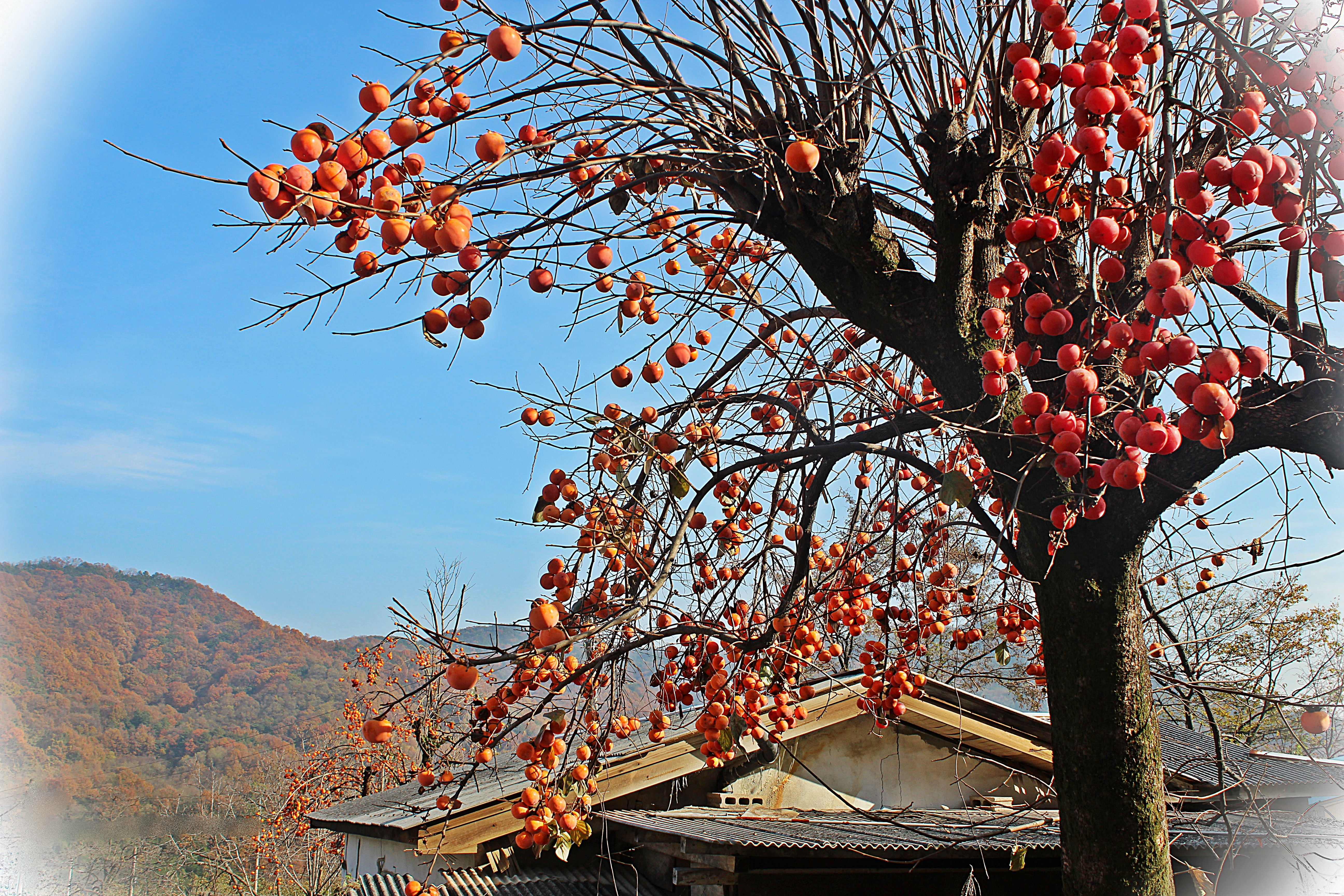 담장밑에 감이 많이달린 감나무?